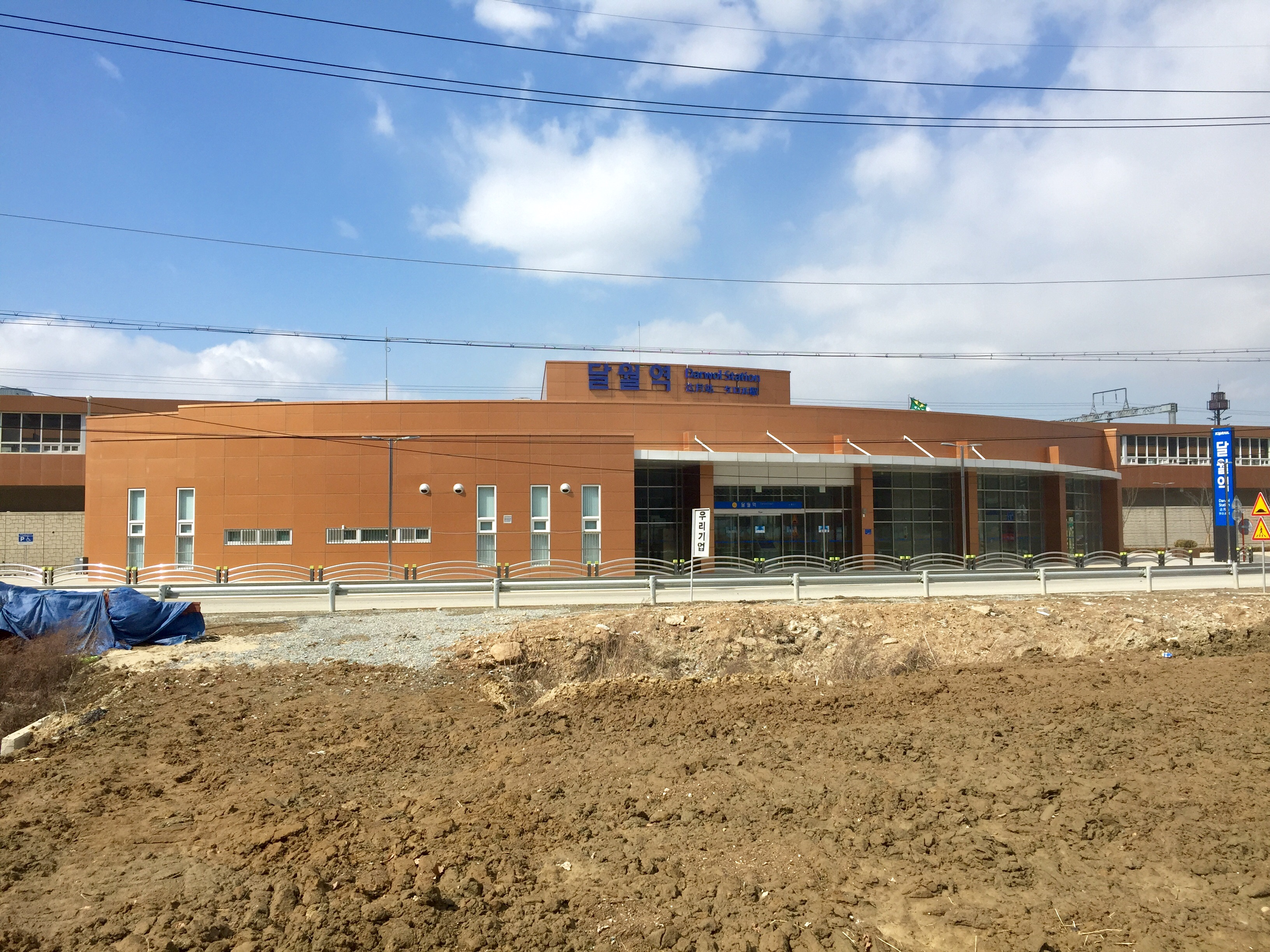 수인선 달월역 역사